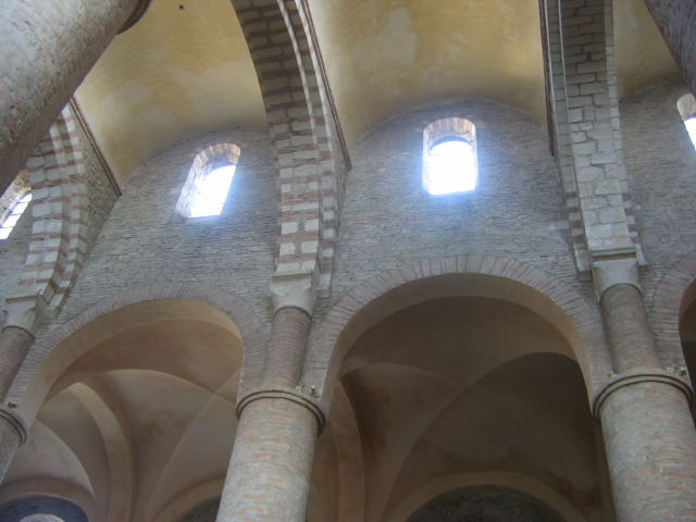 Tournus, Saône-et-Loire, Bourgogne, France. Abbatiale Saint-Philibert. Nef.